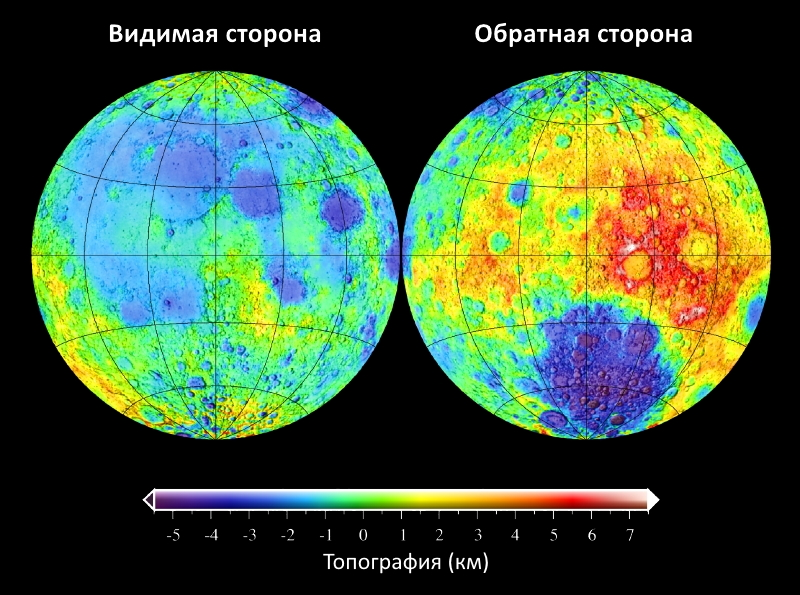 Топографическая разметка Луны.